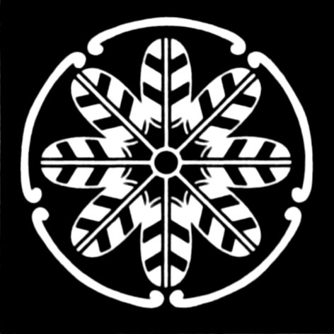 五つ鐶に八つ鷹の羽車